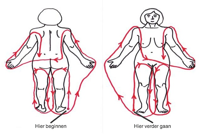 Afkoelen met een waterslang